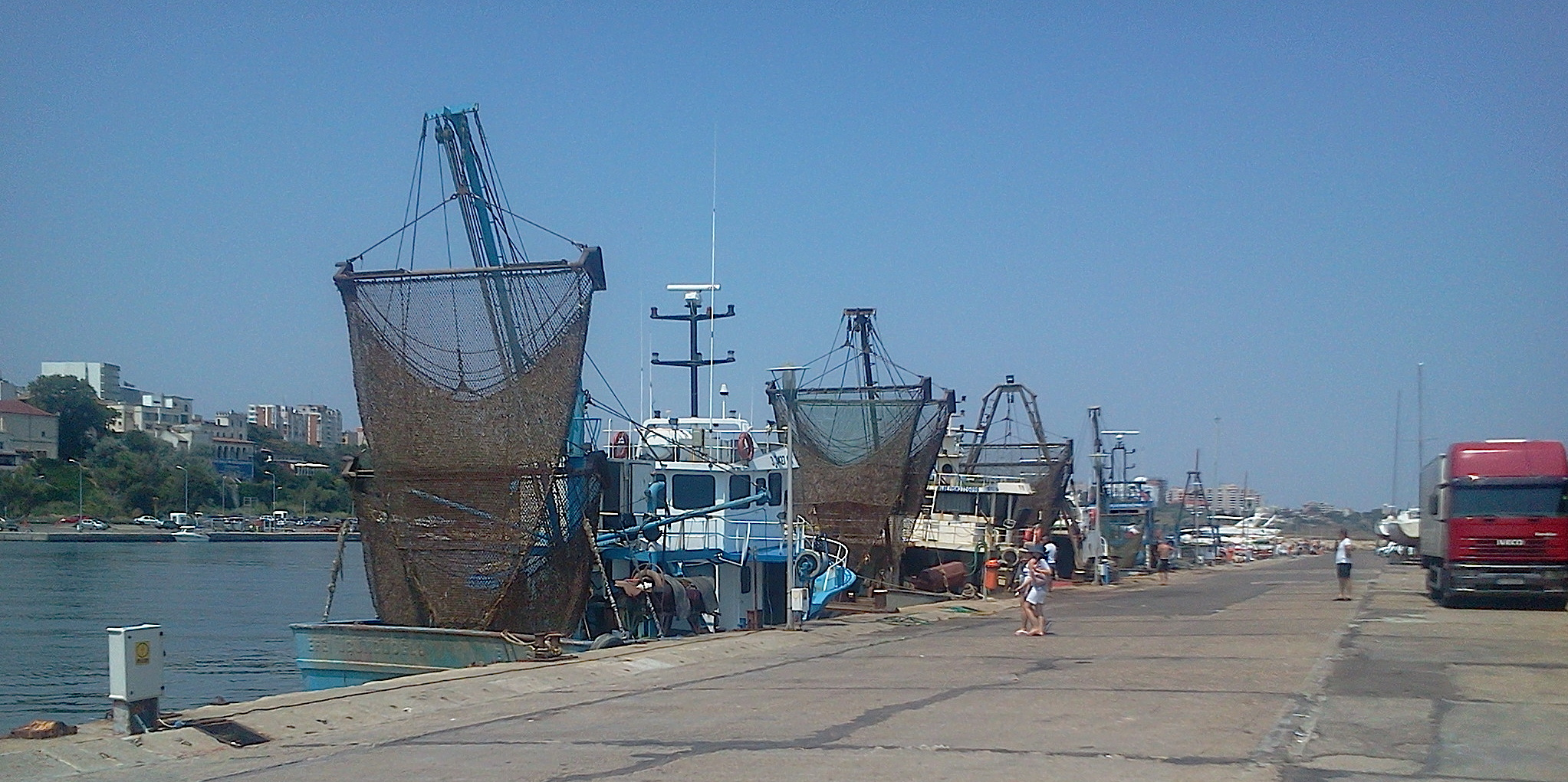 Constanța 2017: portul turistic Tomis, traulere de pescuit rapane